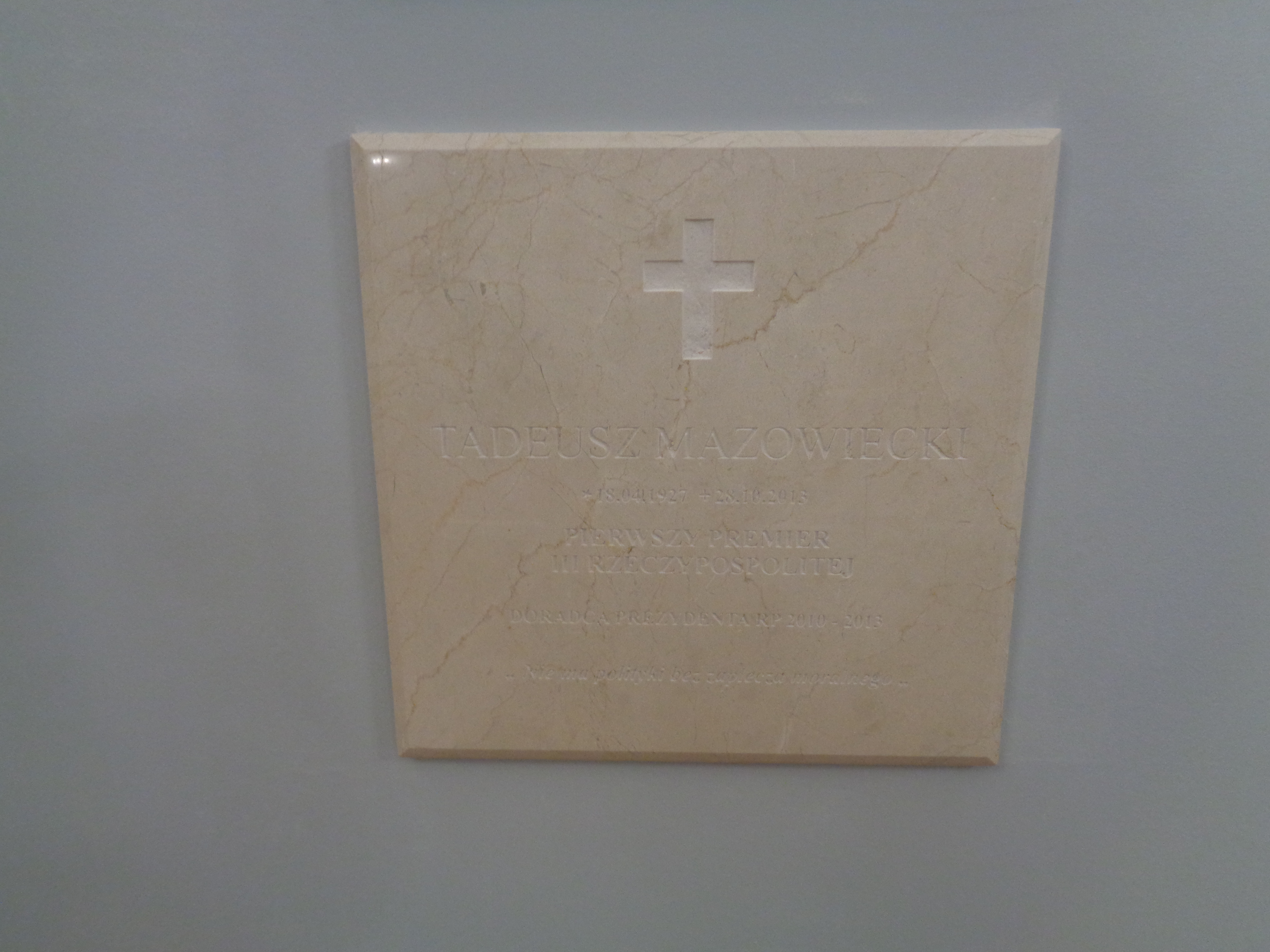 Tablica upamiętniająca Tadeusza Mazowieckiego w kaplicy pałacu prezydenckiego